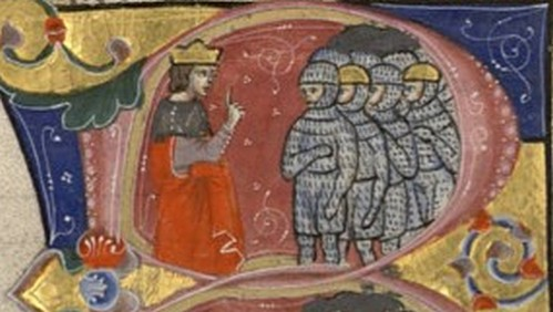 Baudouin IV et son armée